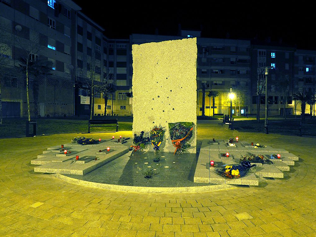 Monumento por la Memoria histórica de Grado, Asturias.